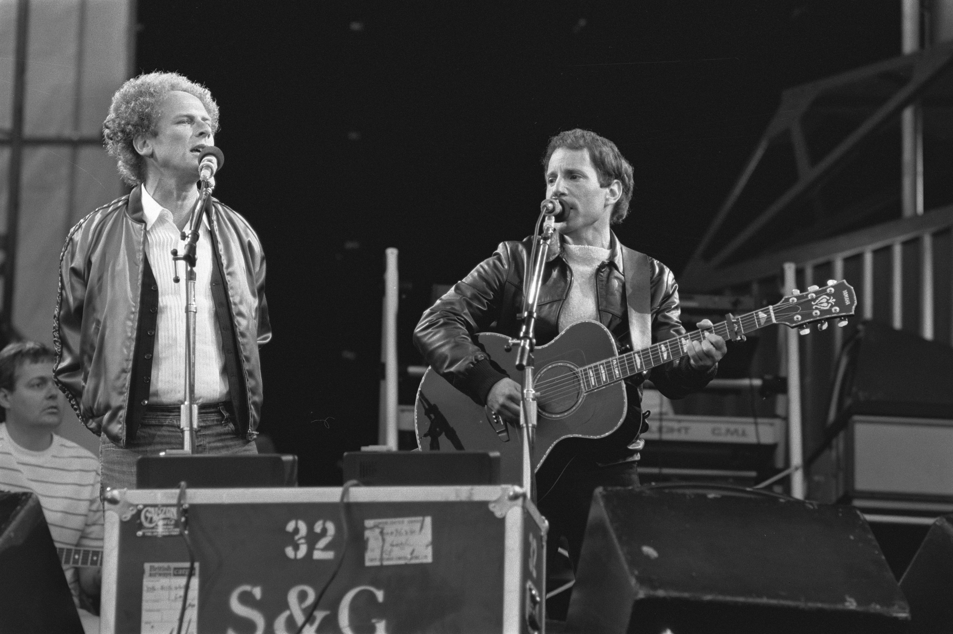 Collectie / Archief : Fotocollectie Anefo Reportage / Serie : [ onbekend ] Beschrijving : Optreden Simon and Garfunkel (links) in Feijenoordstadion, Rotterdam Datum : 12 juni 1982 Locatie : Rotterdam, Zuid-Holland Trefwoorden : musici, muziek, popgroepen, zangers Persoonsnaam : Garfunkel, Art, Simon, Paul Instellingsnaam : Simon & Garfunkel Fotograaf : Bogaerts, Rob / Anefo Auteursrechthebbende : Nationaal Archief Materiaalsoort : Negatief (zwart/wit) Nummer archiefinventaris : bekijk toegang 2.24.01.05 Bestanddeelnummer : 932-2092